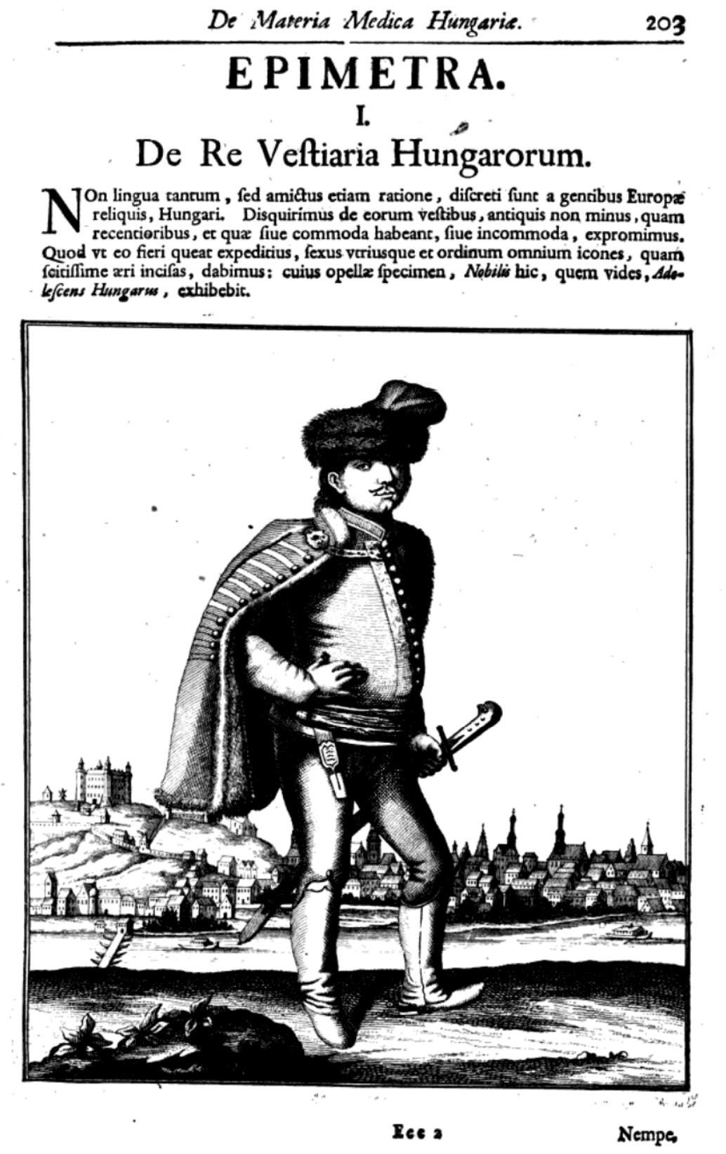 1723-ban jelent meg Bél Mátyás Prodromus (Hungariae antiquae et novae prodromus) című műve, amelyet Mikoviny Sámuel illusztrációi is díszítenek.